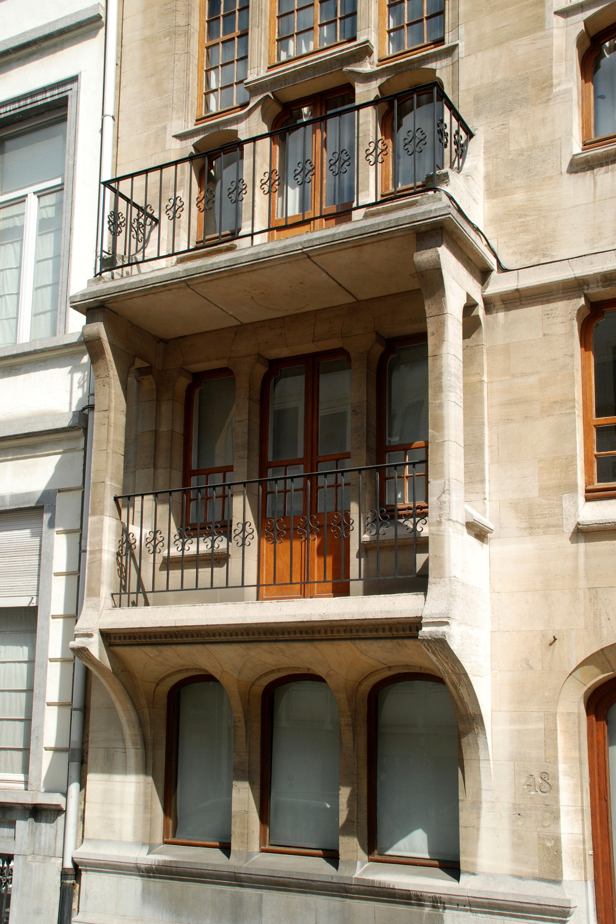 Belgique - Bruxelles - Hôtel Otlet